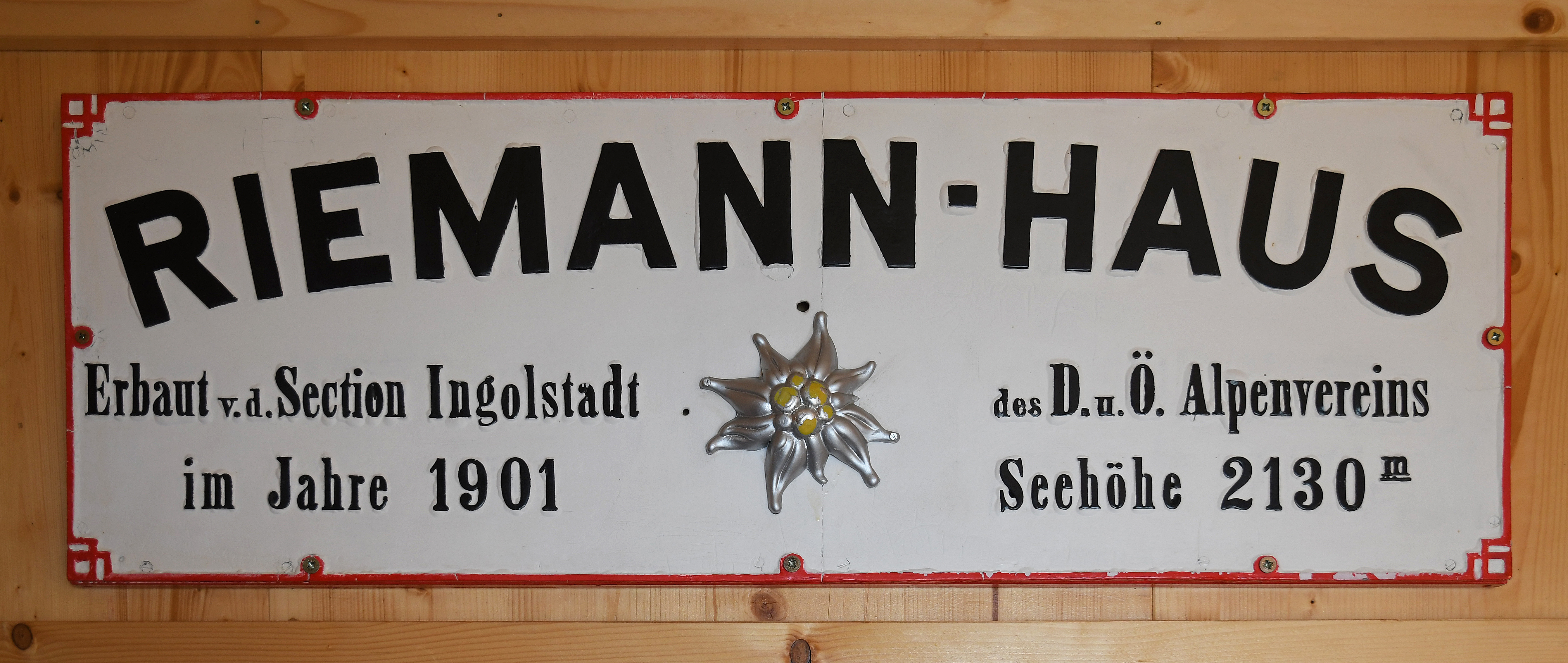 Historisches Hüttenschild des Riemannhauses